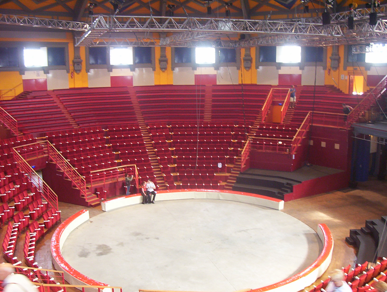 Cirque municipal d'Amiens : scène.